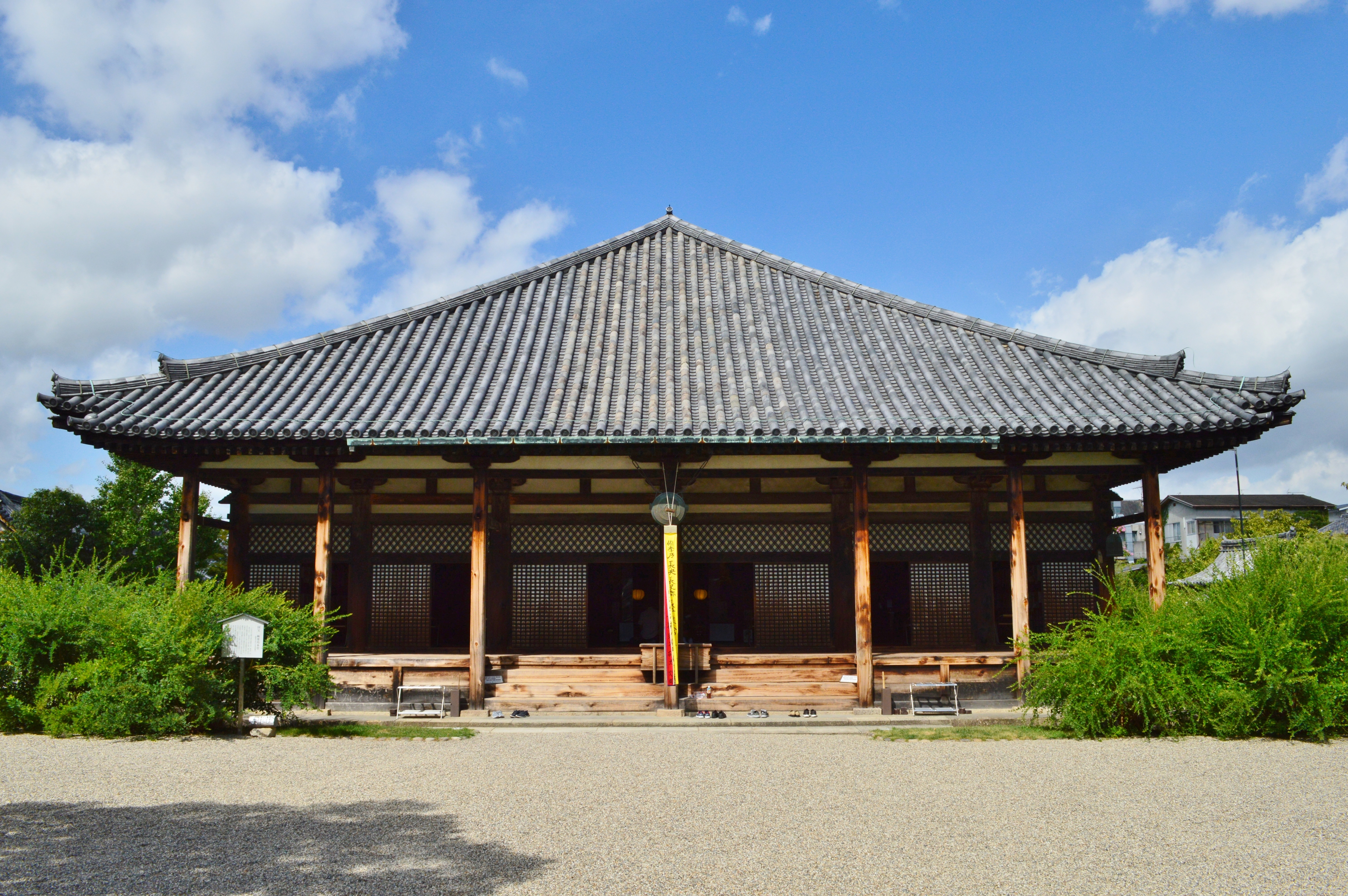 元興寺極楽坊 本堂